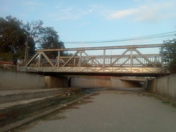 Ura hekurit